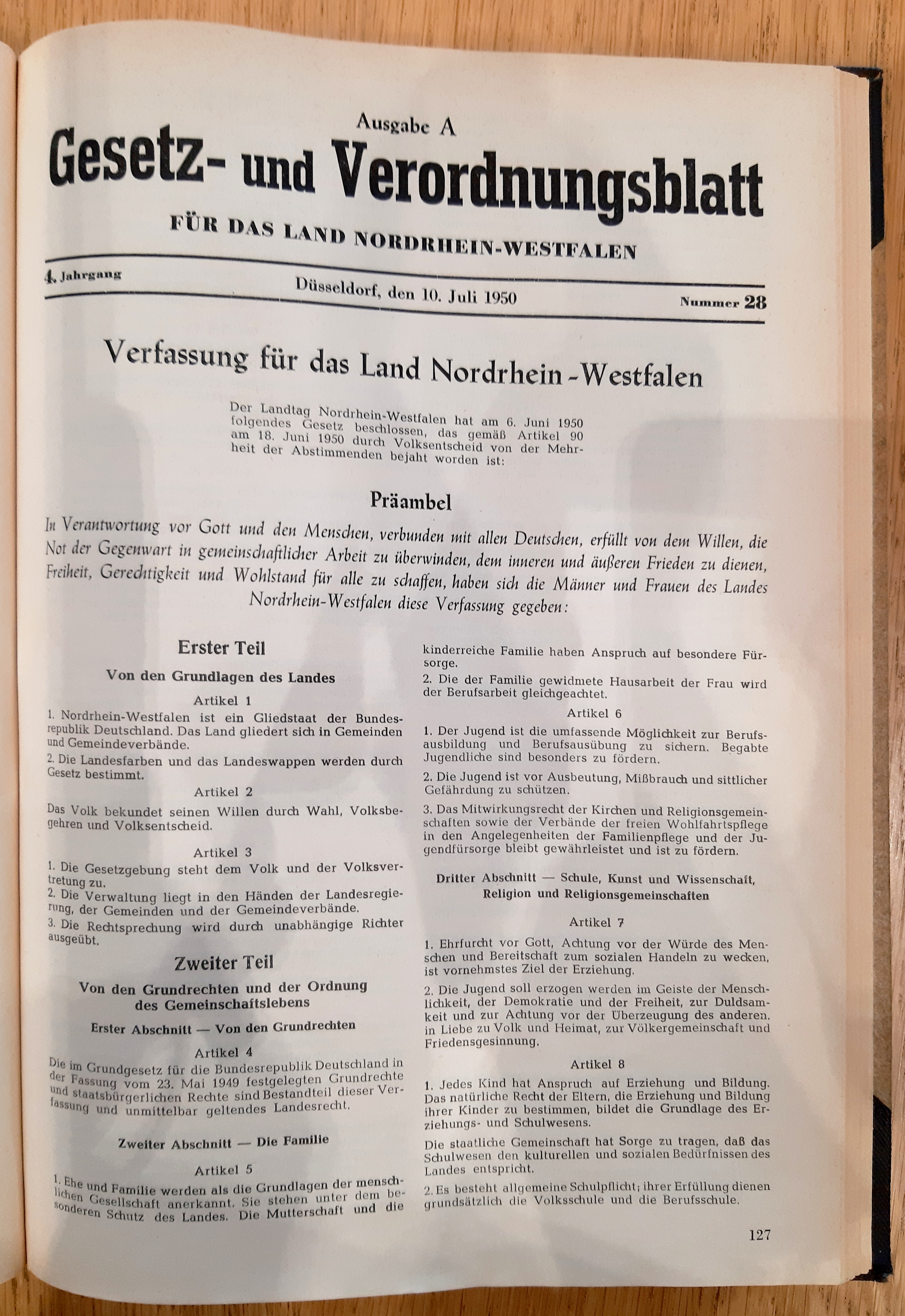 LandesverfassungNRW